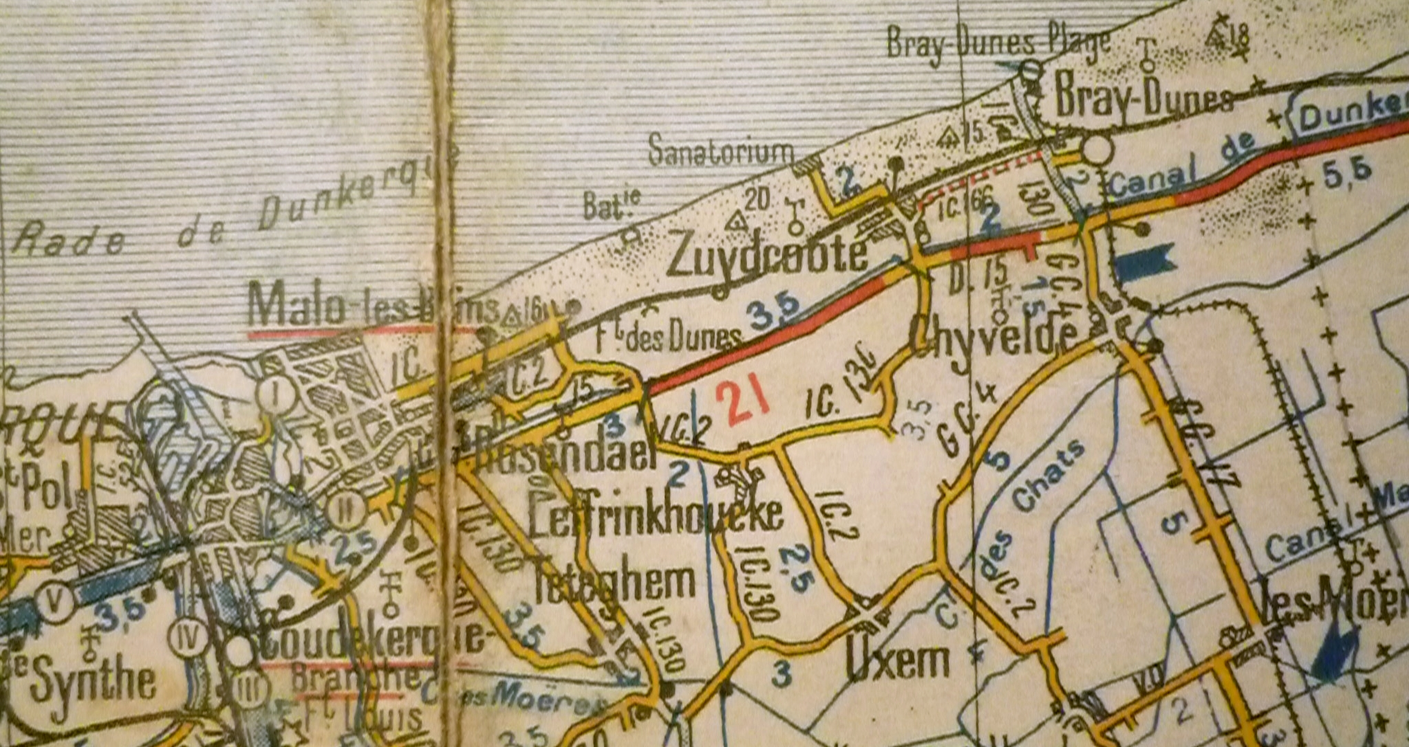 Tracé de l'ancienne Ligne Dunkerque-Locale - Bray-Dunes, Nord-Pas-de-Calais, France